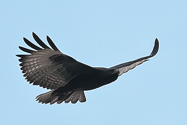 Uganda Augur Buzzard Buteo augur, dark phase Kisoro, SW Uganda